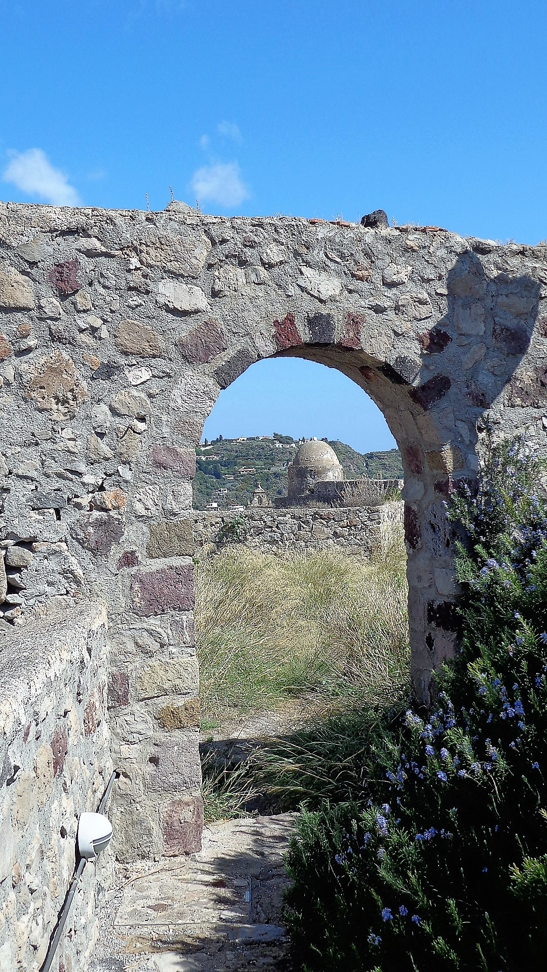 Castello di Lipari, mura e garitta